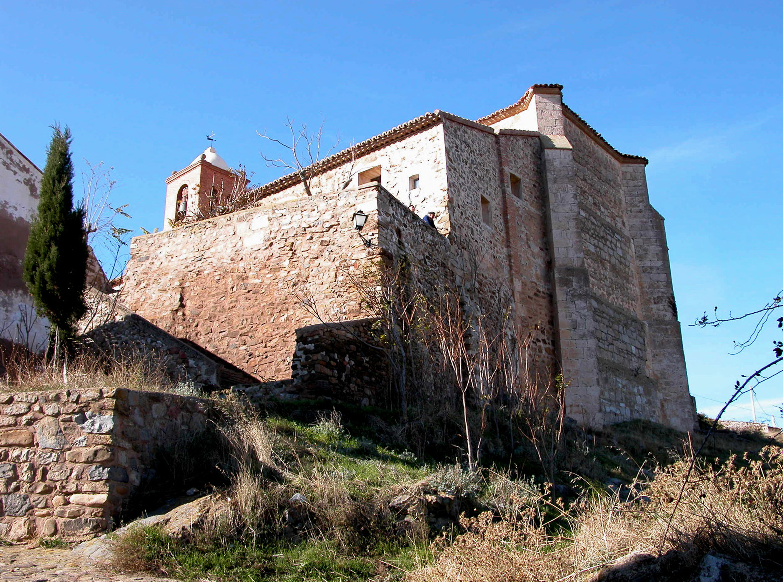 Iglesia de Santa María de la Antigua en Grávalos, La Rioja - España.